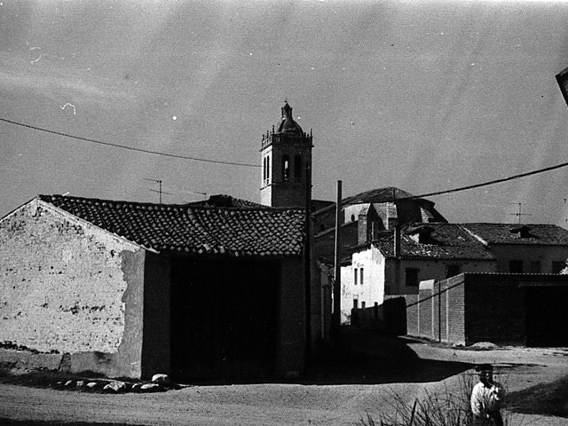 Iglesia de San Martín de Tours - Aldeamayor de San Martín (Valladolid) - Torre de la iglesia de Aldeamayor, dedicada a San Martín. - Fotografía. Papel 126 x 88 B/N